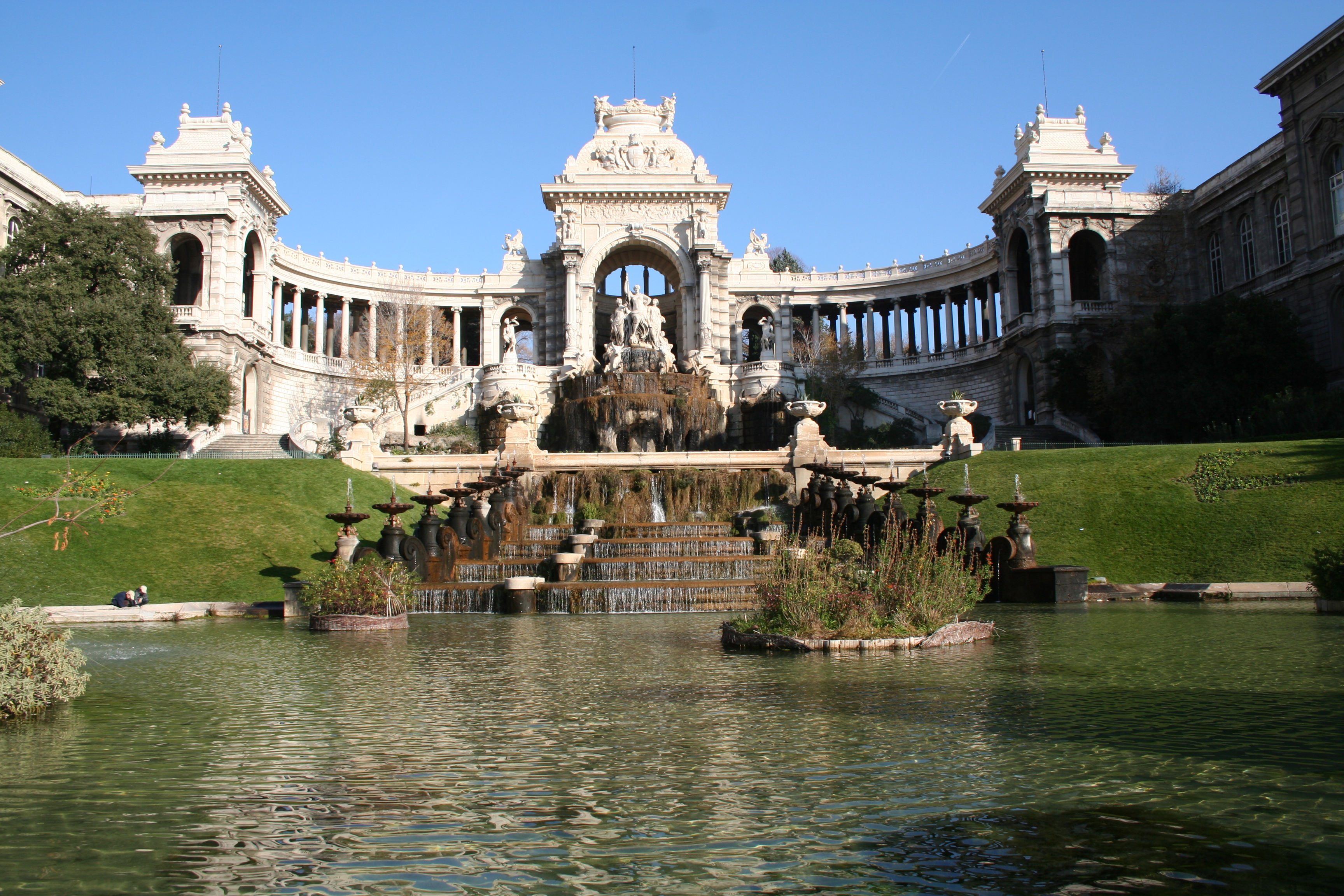 Palais Longchamp, Marseille (France).